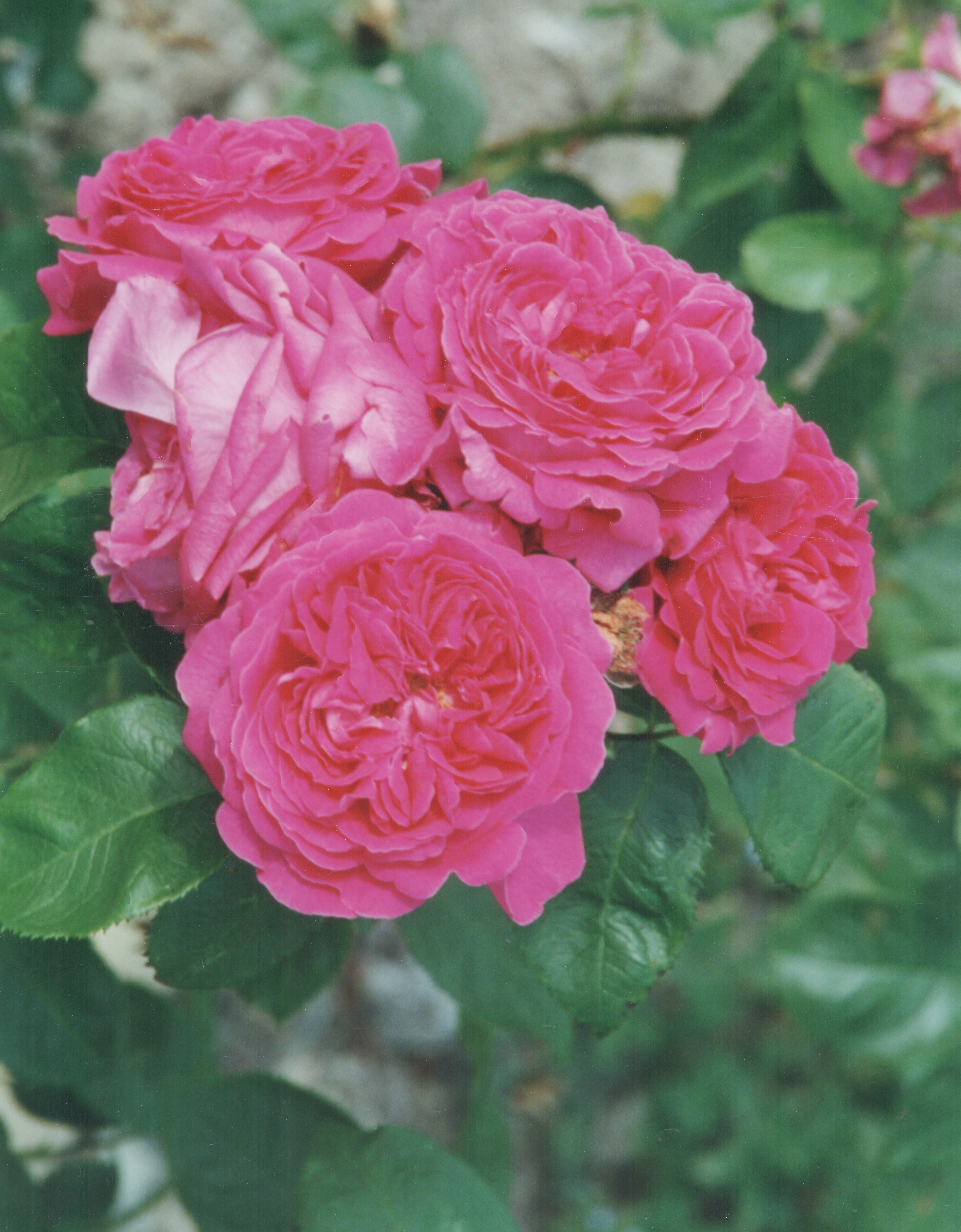 Bouquet de roses Camille Bernardin, 1865, du rosiériste Victor Etienne GAUTREAU de Brie-Comte-Robert, photo juin 1997